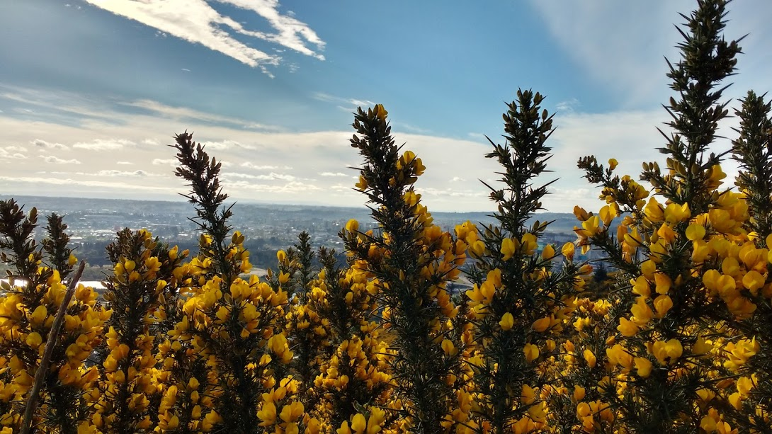 Flores de Ulex europaeus cubriendo parte del cerro Conun Huenu, de la comuna de Padre Las Casas, en el área metropolitana de Temuco, Chile.